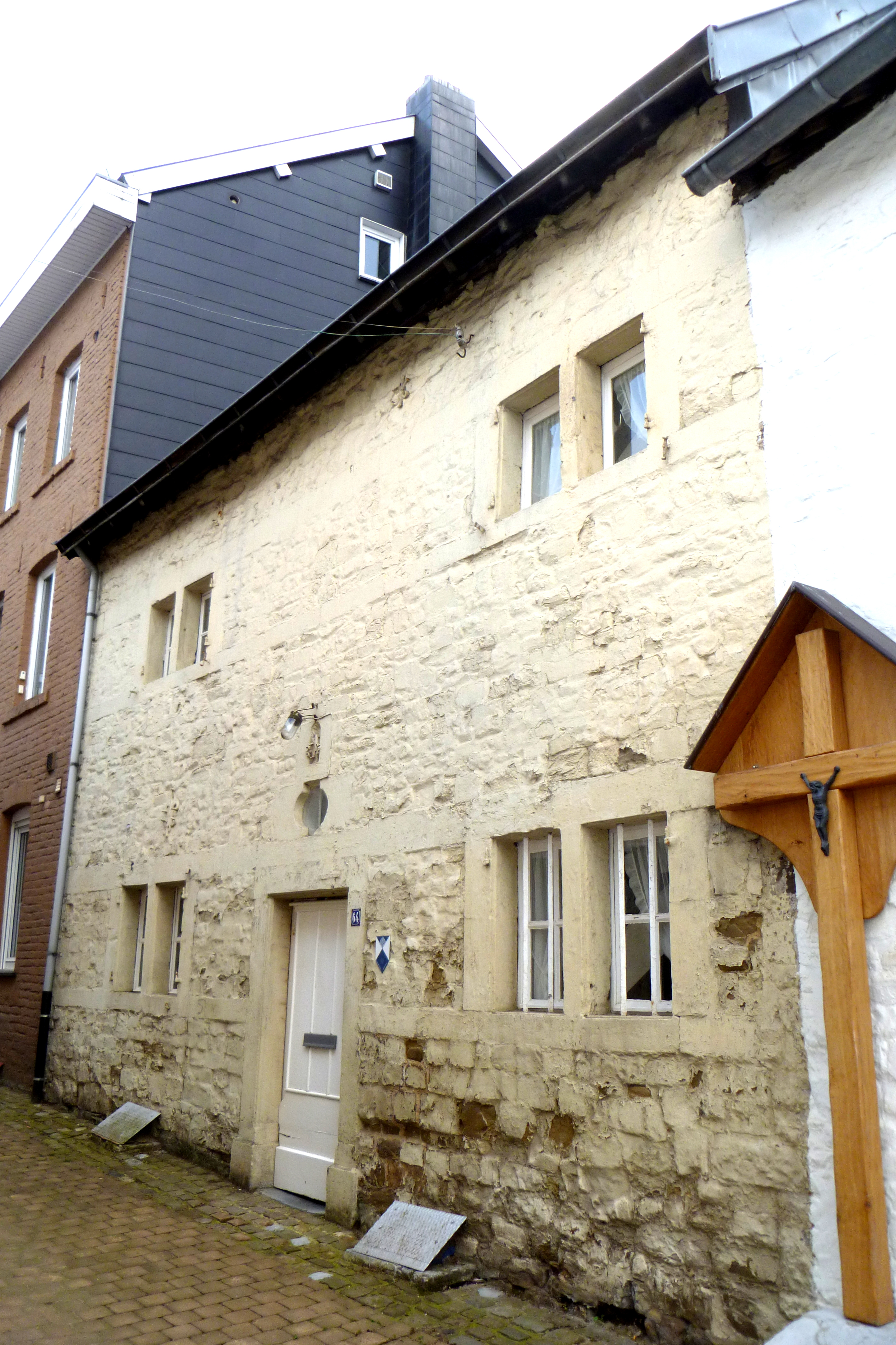 Baudenkmal in Eupen, in der ehemaligen Bergstraße